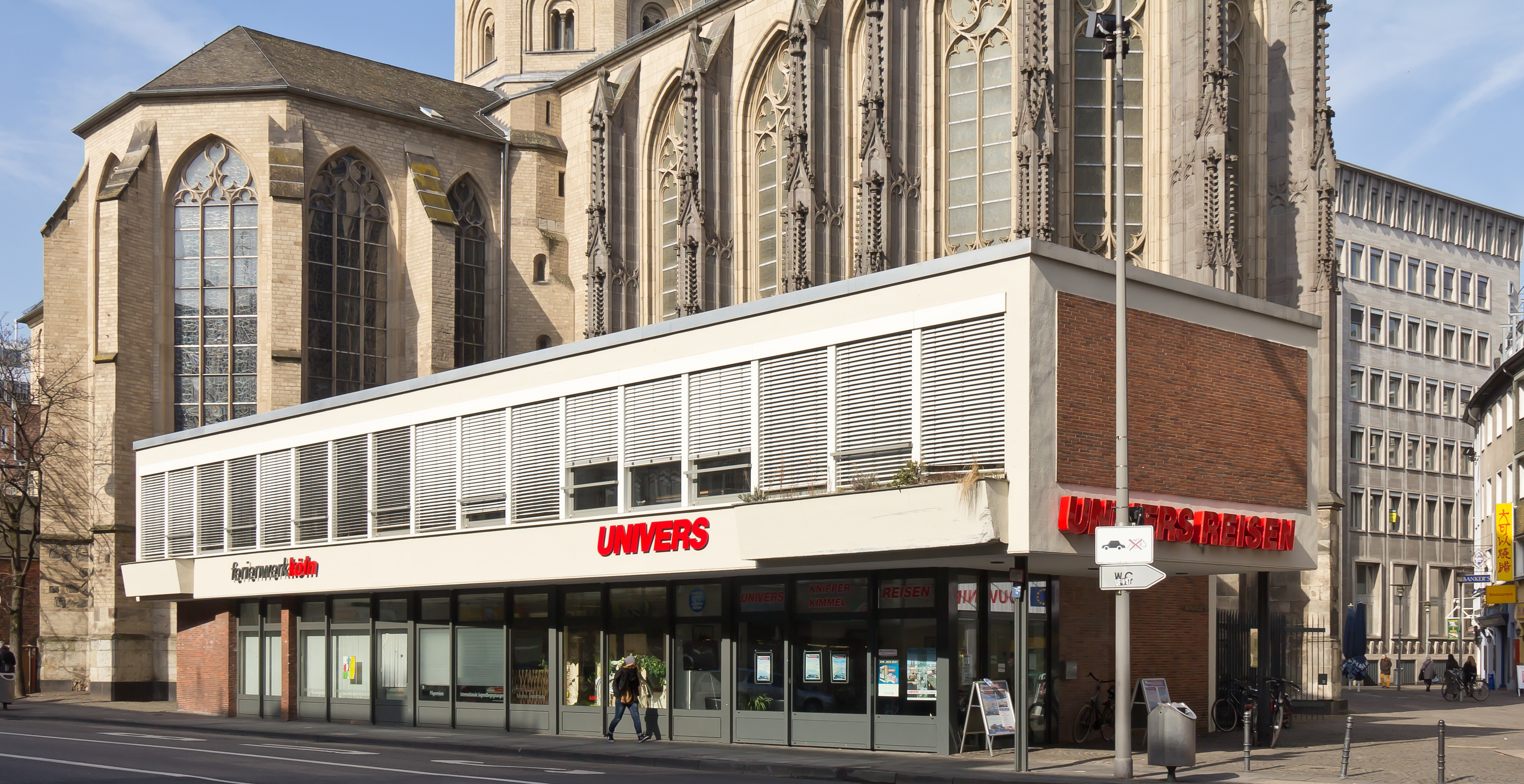 Denkmalgeschütztes Geschäftshaus, Pavillongebäude, Eckgebäude zu Andreaskloster, erbaut für die Sparkasse der Stadt Köln. Architekt: Theodor Kelter und Joachim Schürmann. Baujahr: 1956